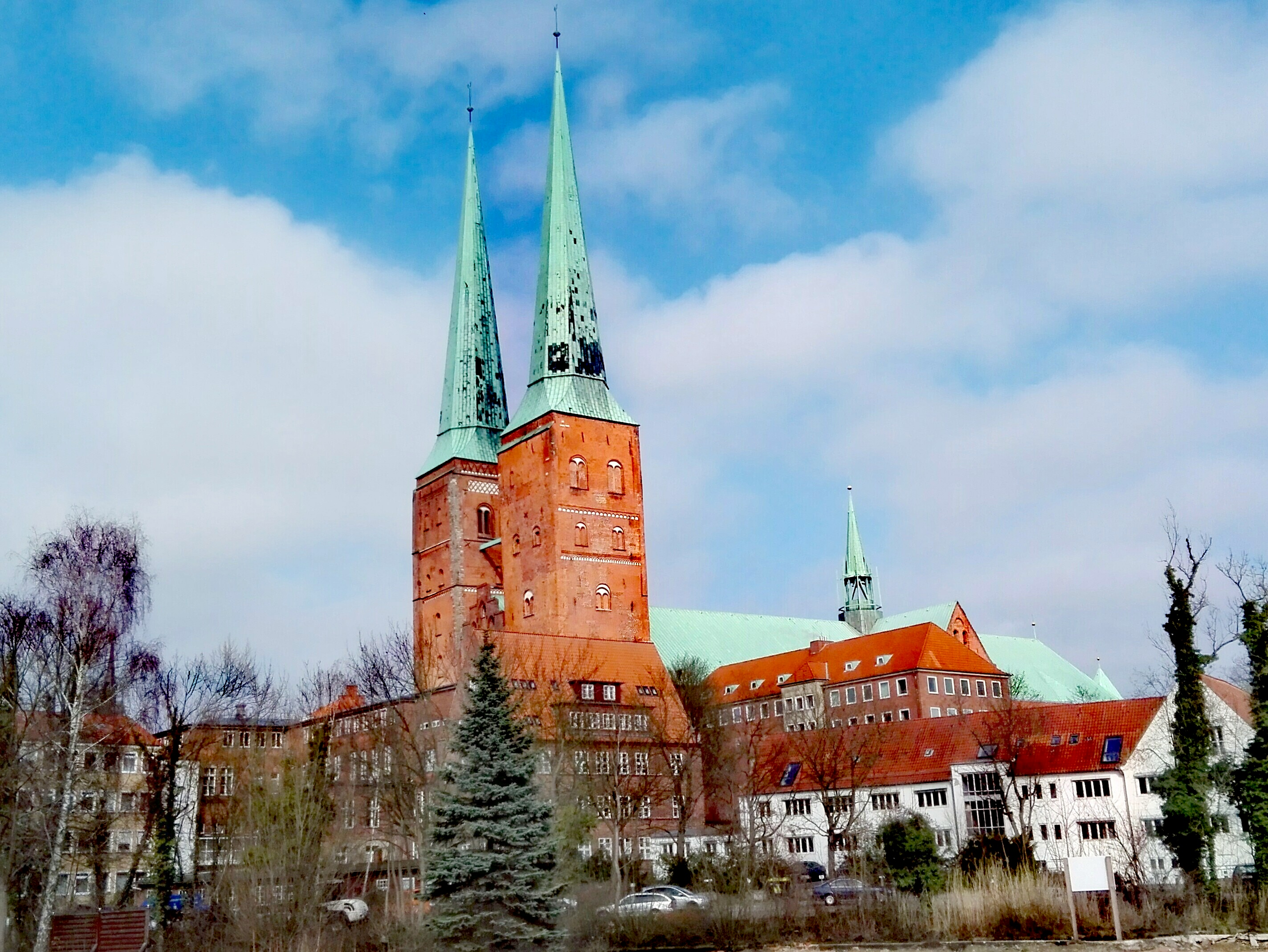 Sicht von Südwesten aus